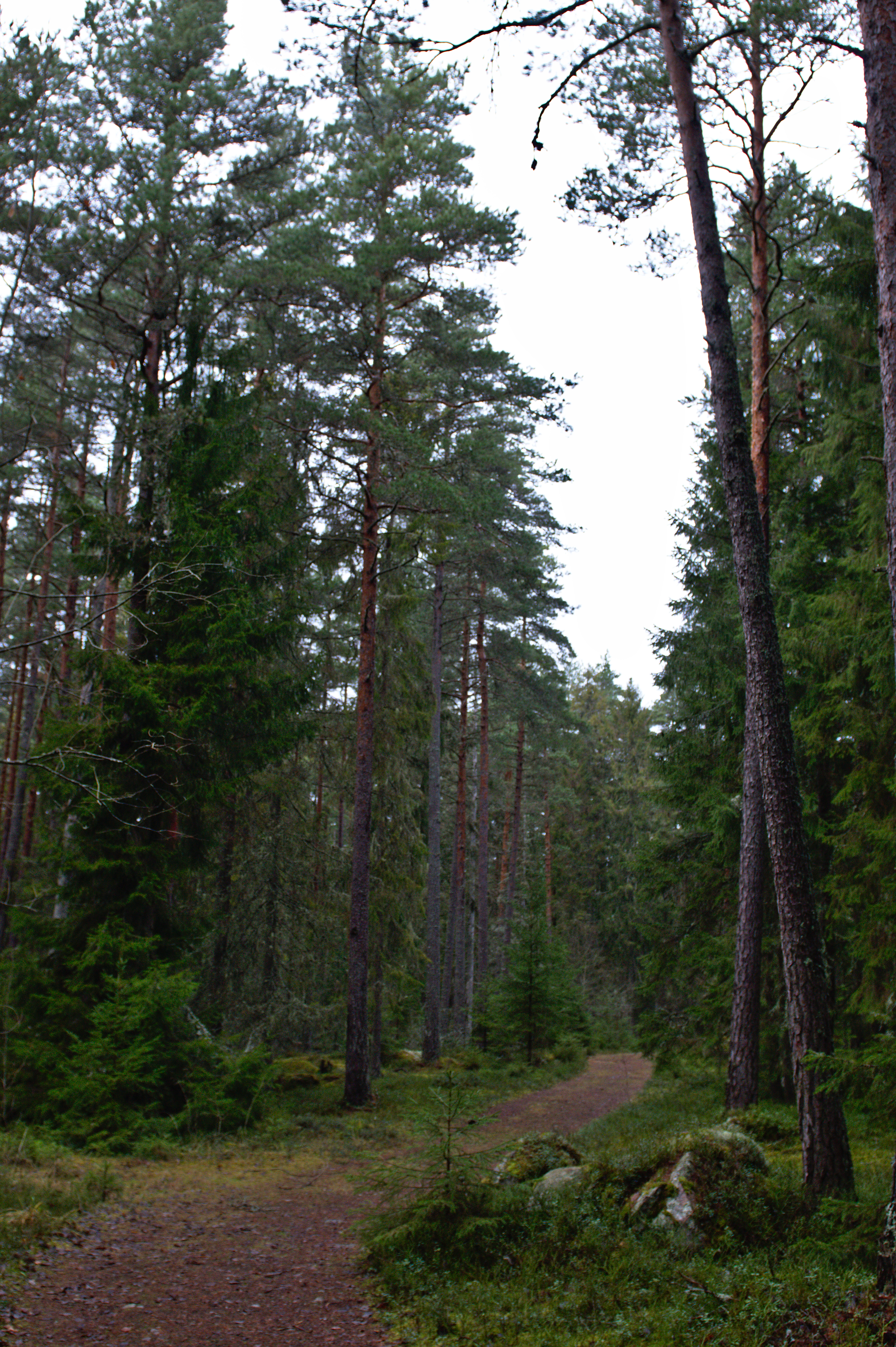 Tolamossens naturreservat i Eskilstuna kommun. Stig genom område med höga tallar.